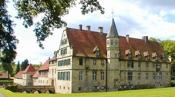 Haus Havixbeck - Wohnsitz des Baron von Twickel